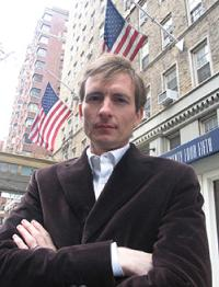 Michiel Vos